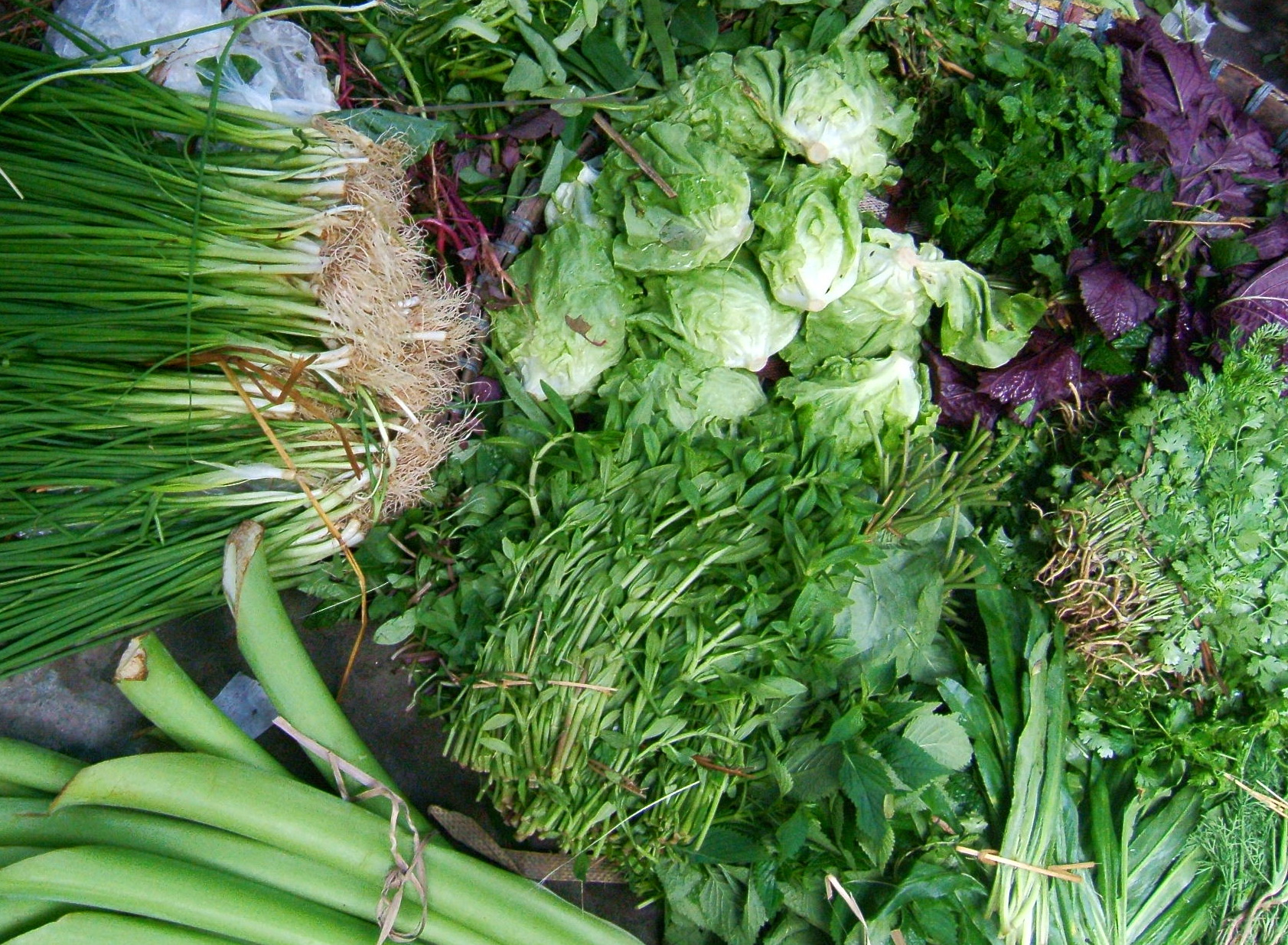 Một số loại rau thơm: hành, ngò om, ngò gai, tía tô, rau mùi, xà lách, húng